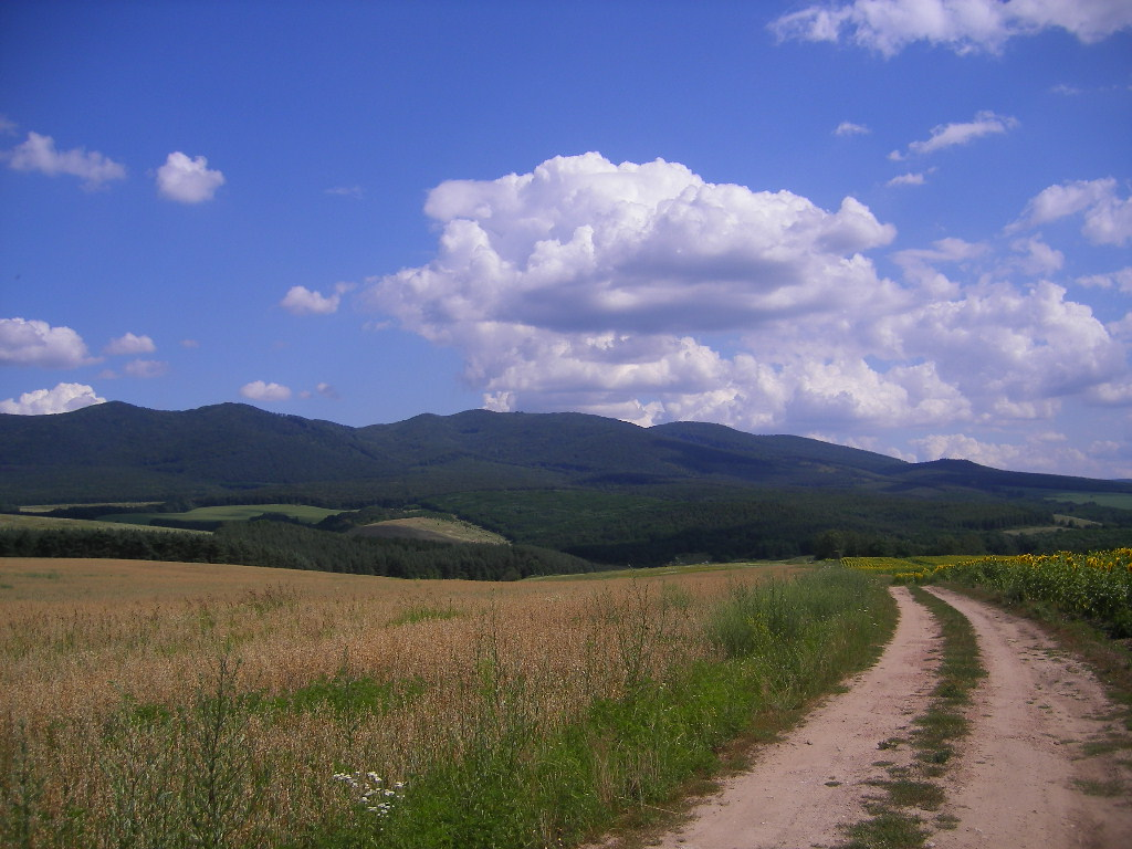 Perőcsény - tájkép a falutól délre (Börzsöny-hegység)